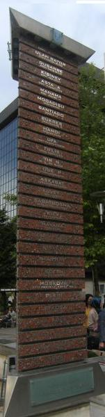 Ankara'nın kardeş şehirleri anıtı